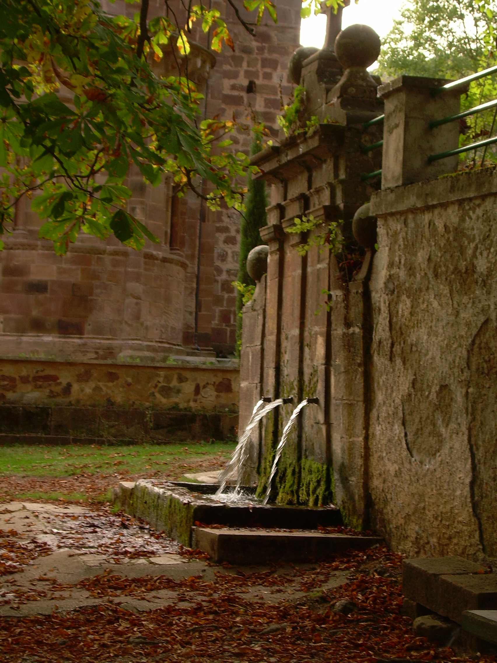 Fuente de Tresfuentes (Valgañón, La Rioja)